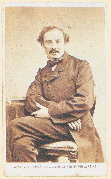 Portret van J.J. Cremer (1827-1880)